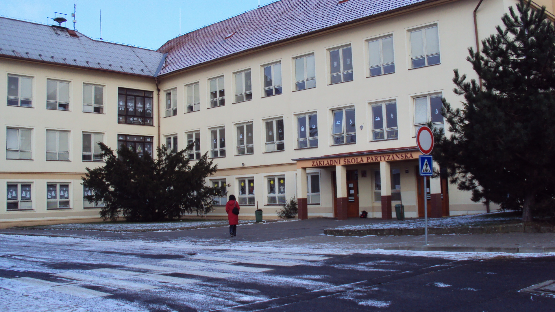 Základní škola Partyzánská, čtvrť Svárov v České Lípě